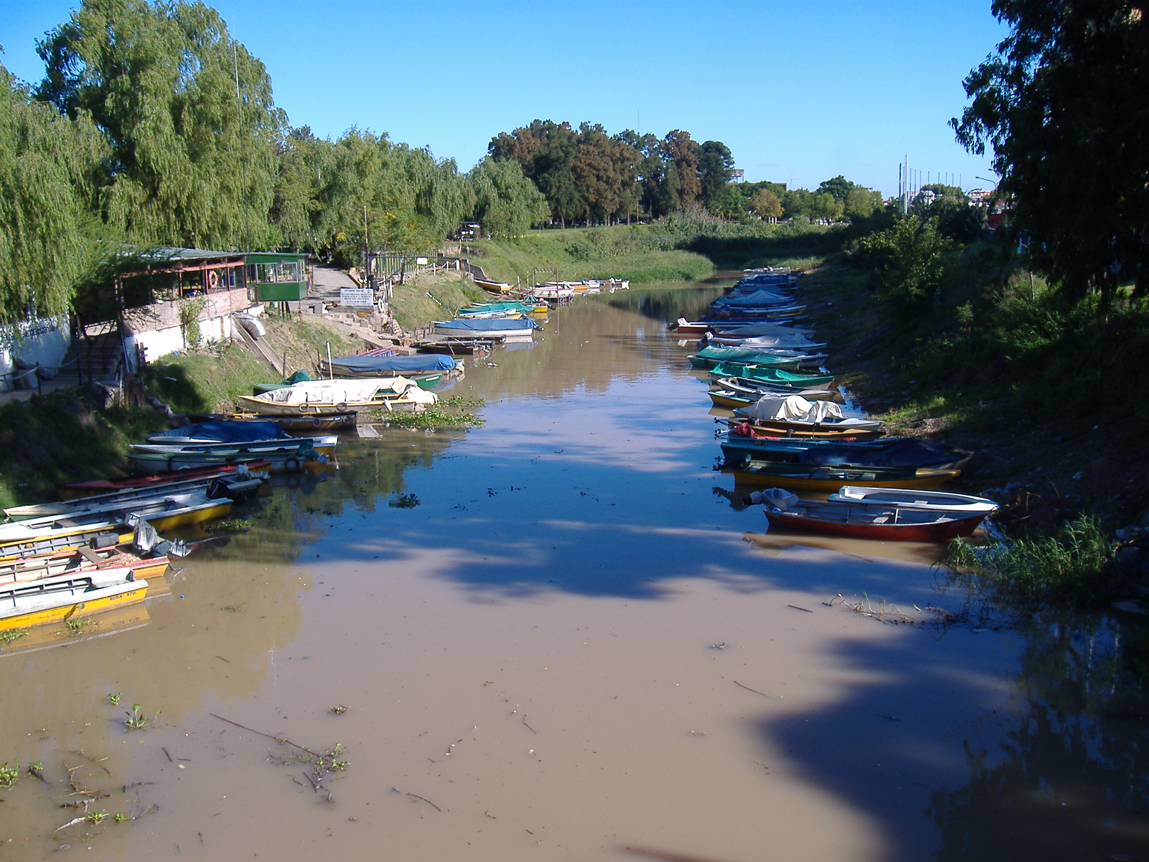 Desembocadura del Ludueña The end of the Ludueña Stream, in Rosario, Argentina. The stream (in fact a small river) is piped underground and re-emerges in the Alem Park, a few hundred meters from the Paraná River, where it empties. This picture was taken by Pablo D. Flores on 1 April 2006.